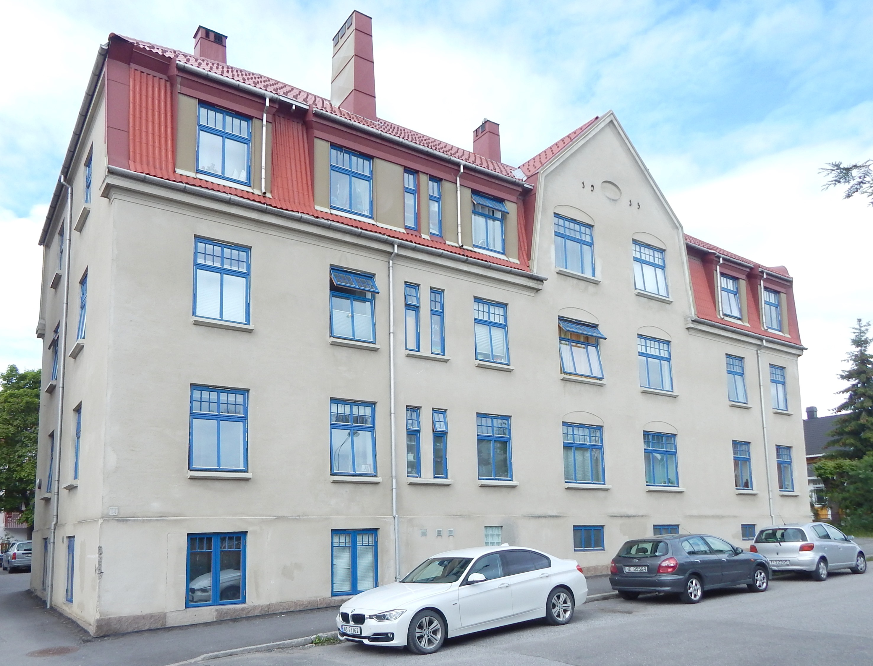 Welhavens gate 14 på Hamar. Arkitekt: Christian Reuter.